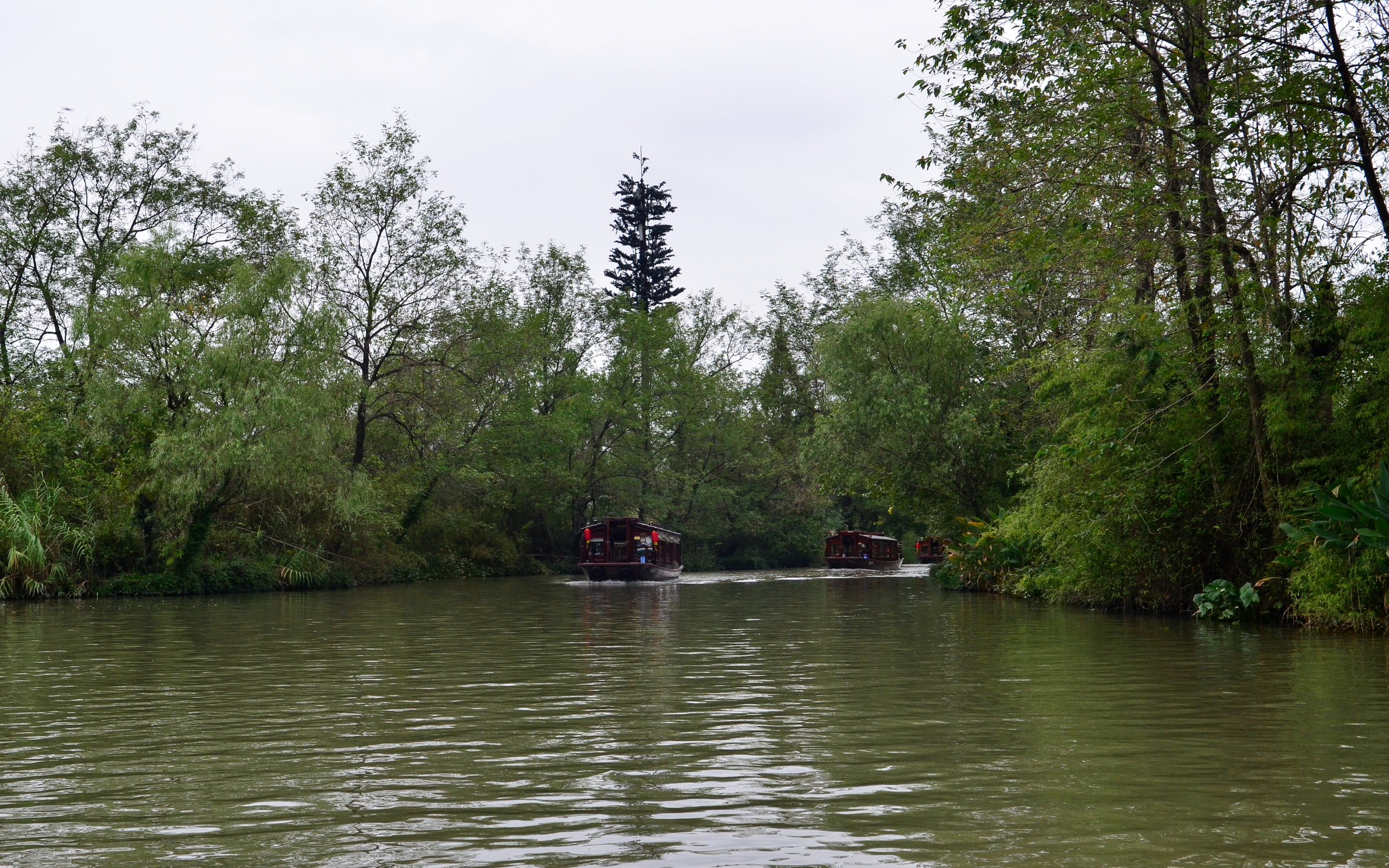 杭州西溪国家湿地公园西区